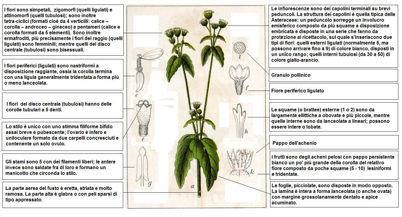 Galinsoga parviflora Strum DESC